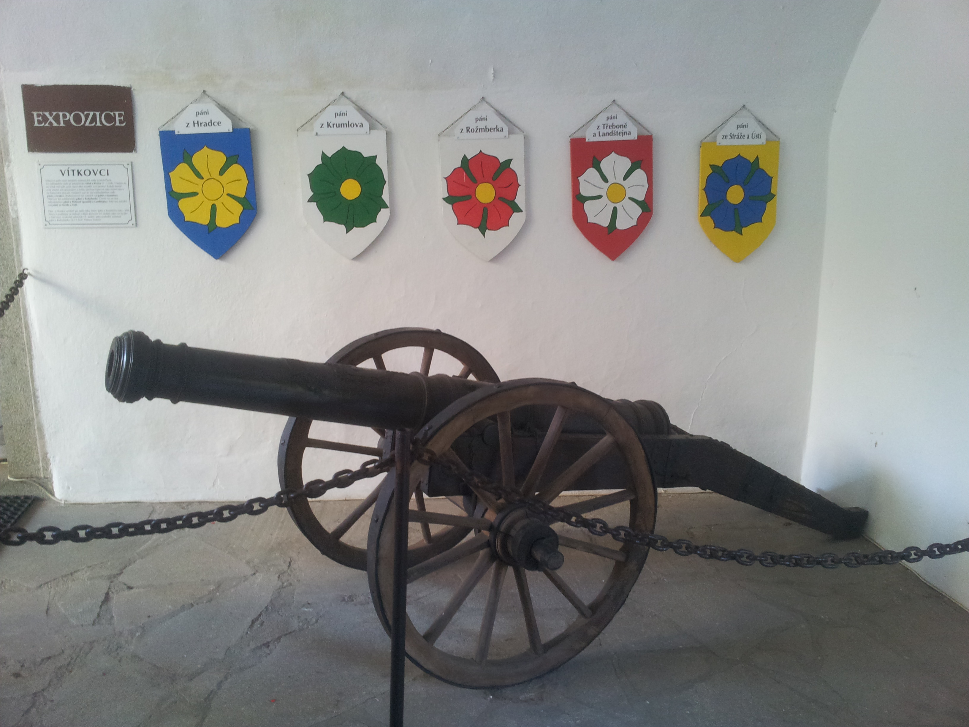 Všech 5 erbů Vitkovcu - Hrad Landštejn.